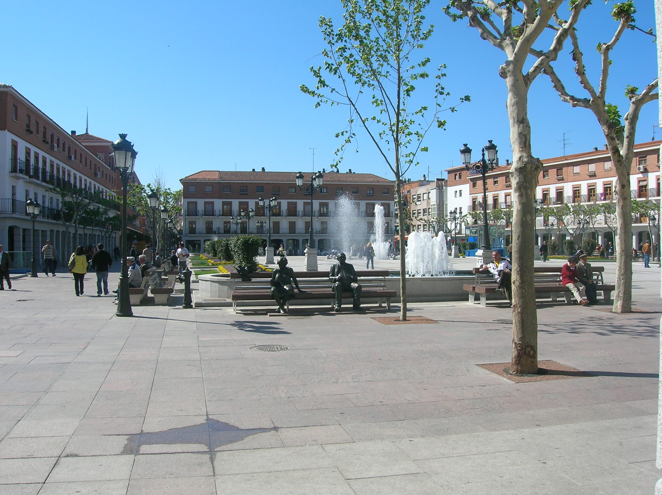 Imagen de la Plaza Mayor de Torrejón de Ardoz